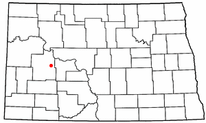 map